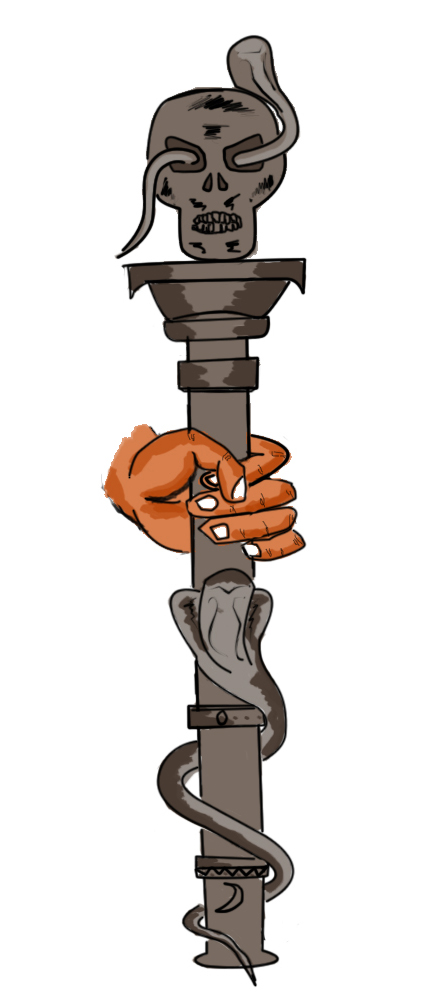 கட்வங்கம் (ஆங்கிலம்:Katvangam) என்பது சிவபெருமானுடைய ஆயுதங்களில் ஒன்றாகும்.